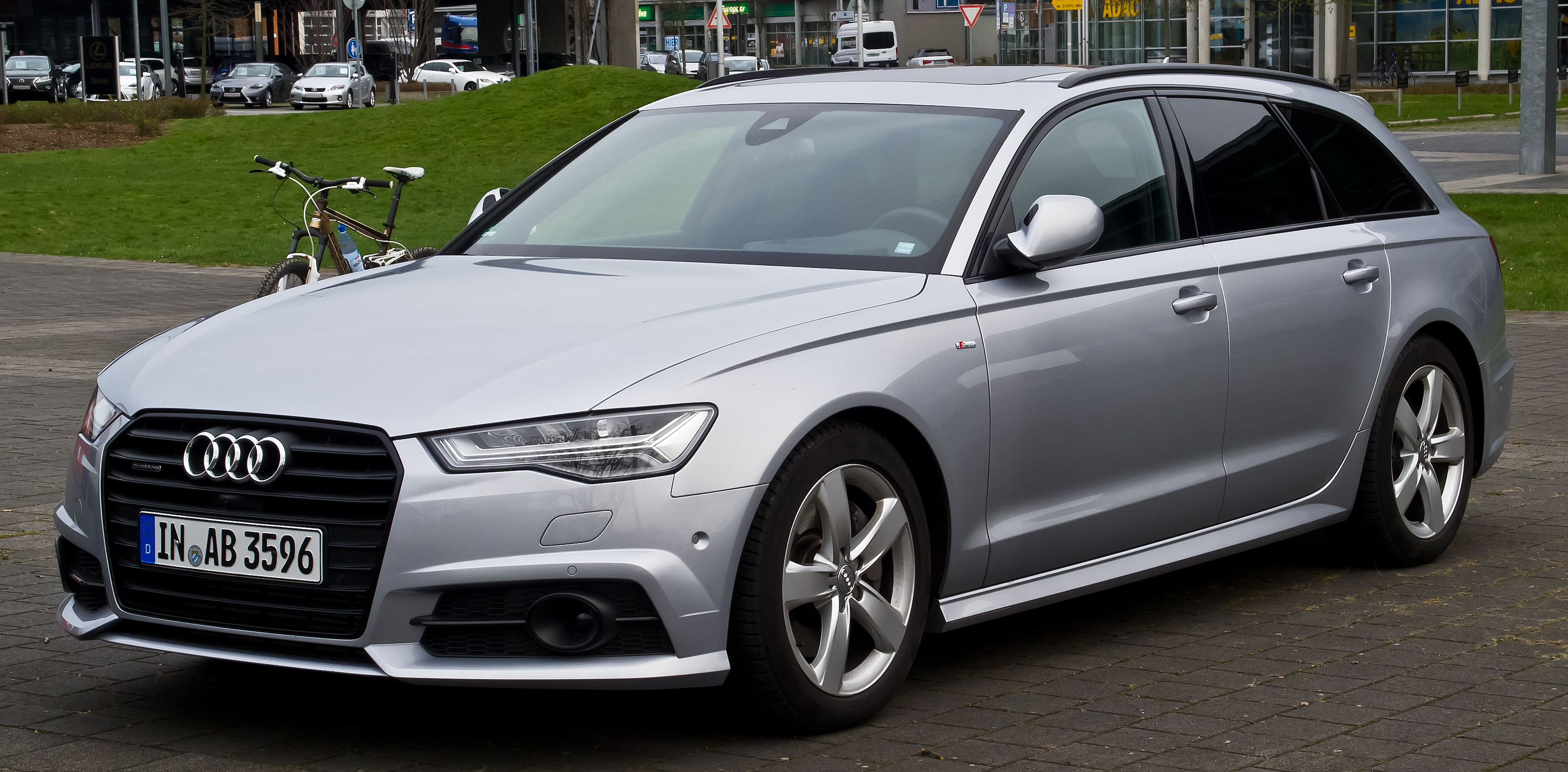 Audi A6 Avant TDI quattro S-line (C7, Facelift)